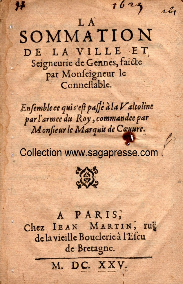 Cette feuille d'annonce, imprimée chez Jean Martin, est parue avant les Nouvelles Ordinaires de Divers Endroits.